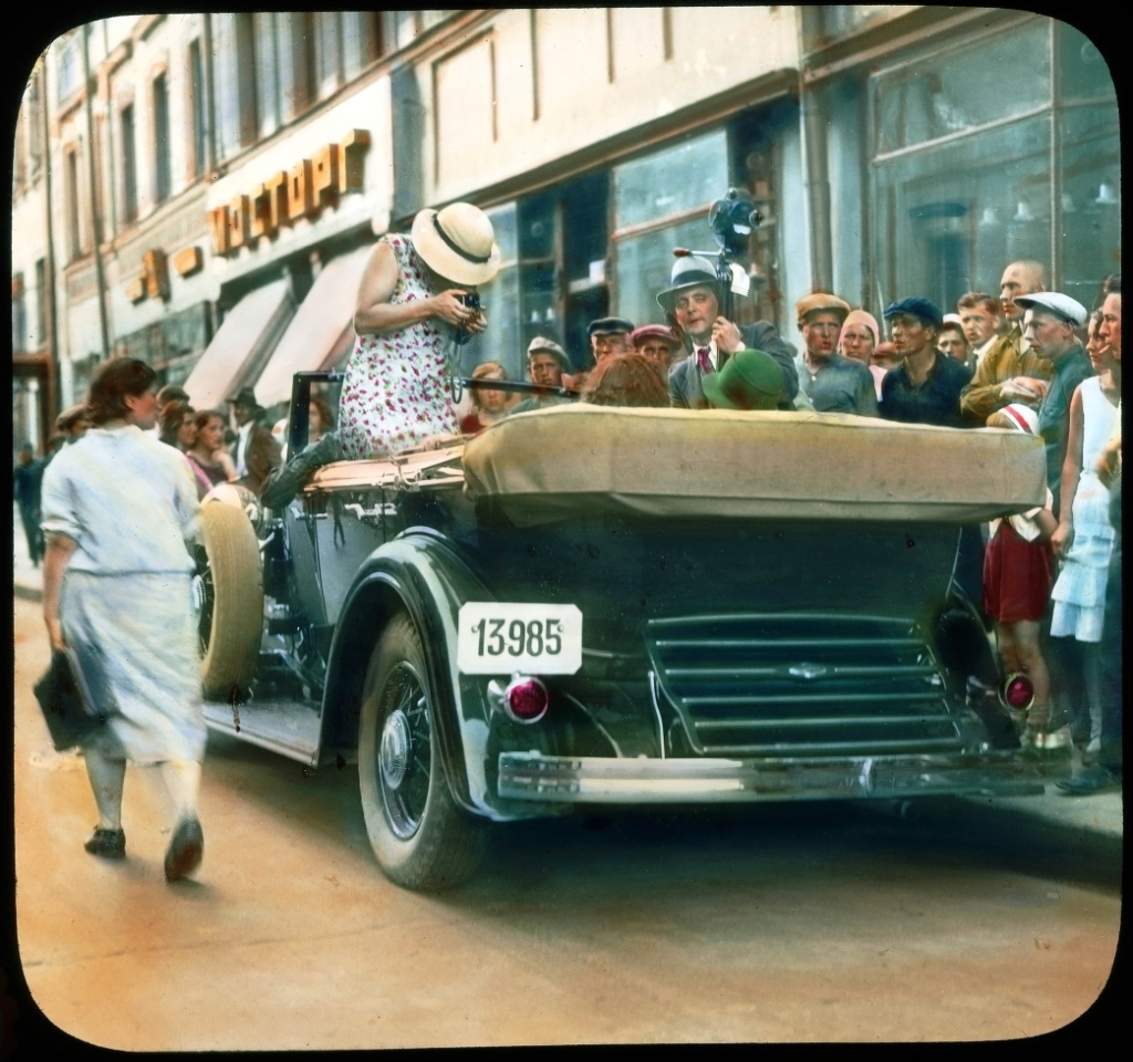 Москва. Иностранные фотографы у МосТорга